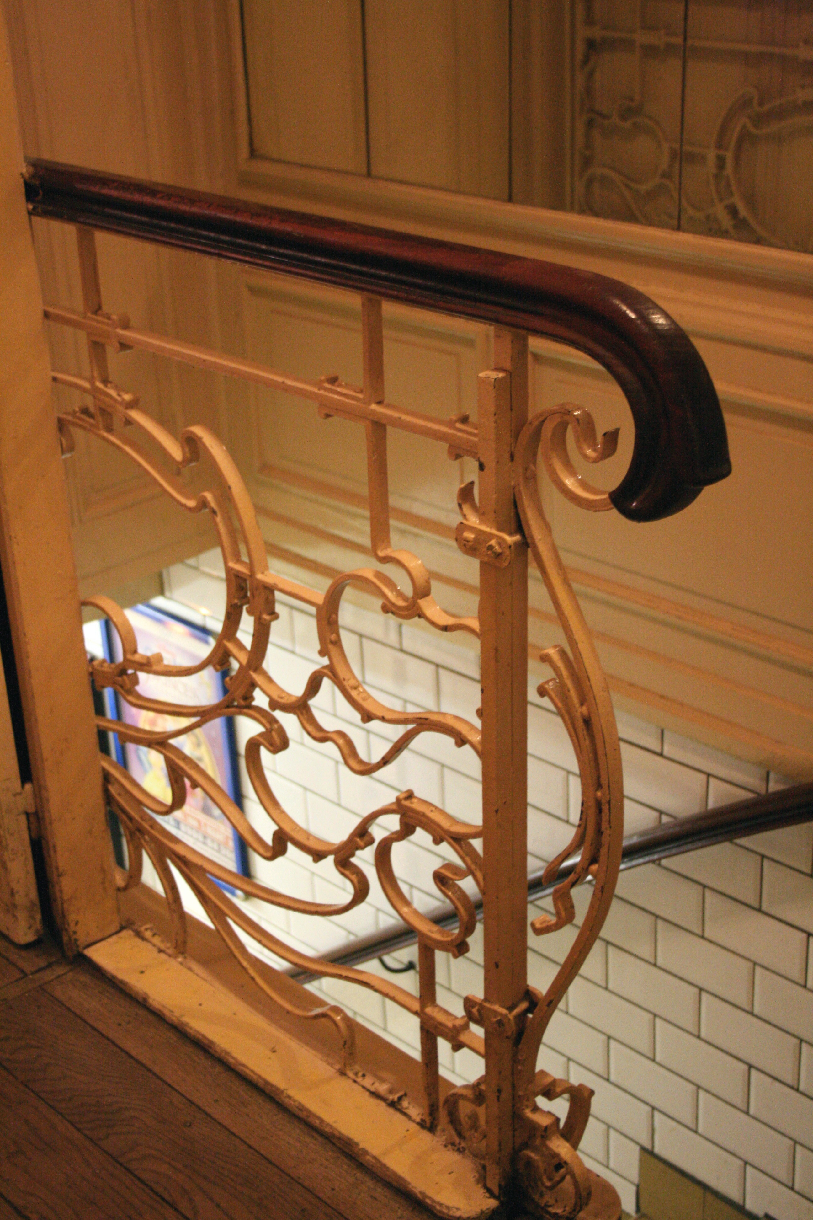 Rue Henri Maus 17-23, Bruxelles (Belgique). Café-restaurant "Le Falstaff". Ferronnerie Art Nouveau de l'escalier conduisant aux toilettes